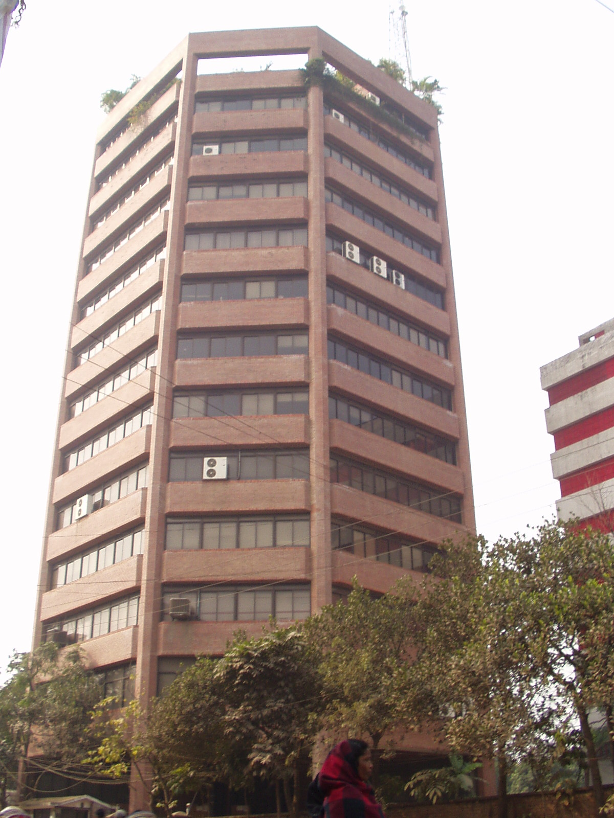 Proshika Building, mirpur-6. -mamun2a